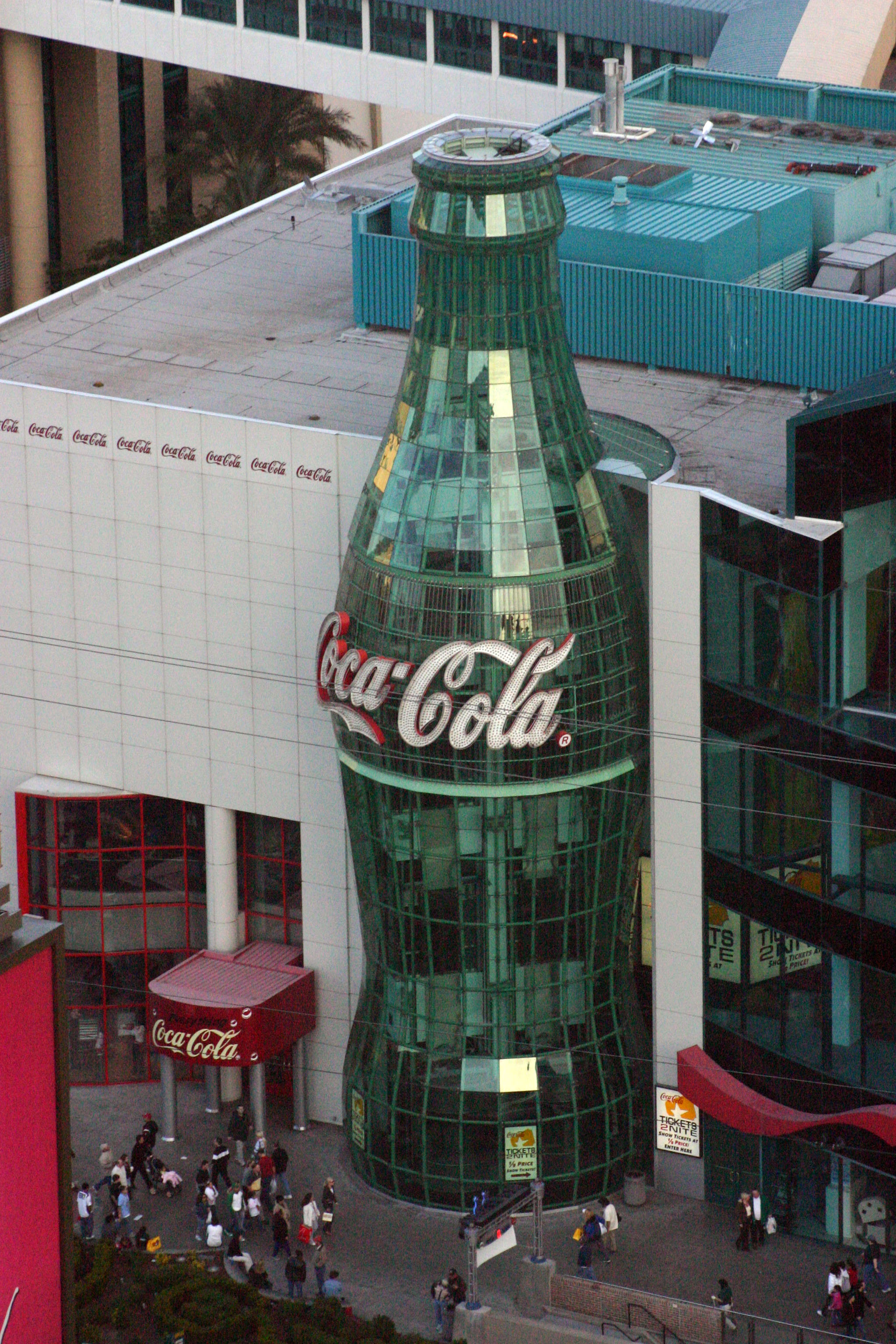 Tienda oficial de Coca-Cola en Las Vegas.